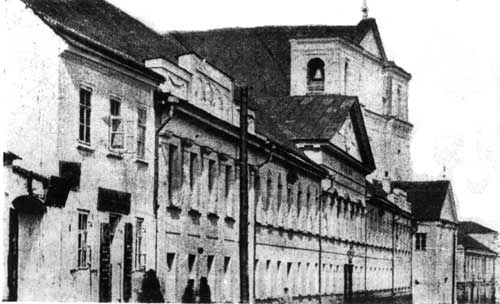 Dominkanie Grodno. Kościół zniszczony przez Rosjan w XIX wieku.